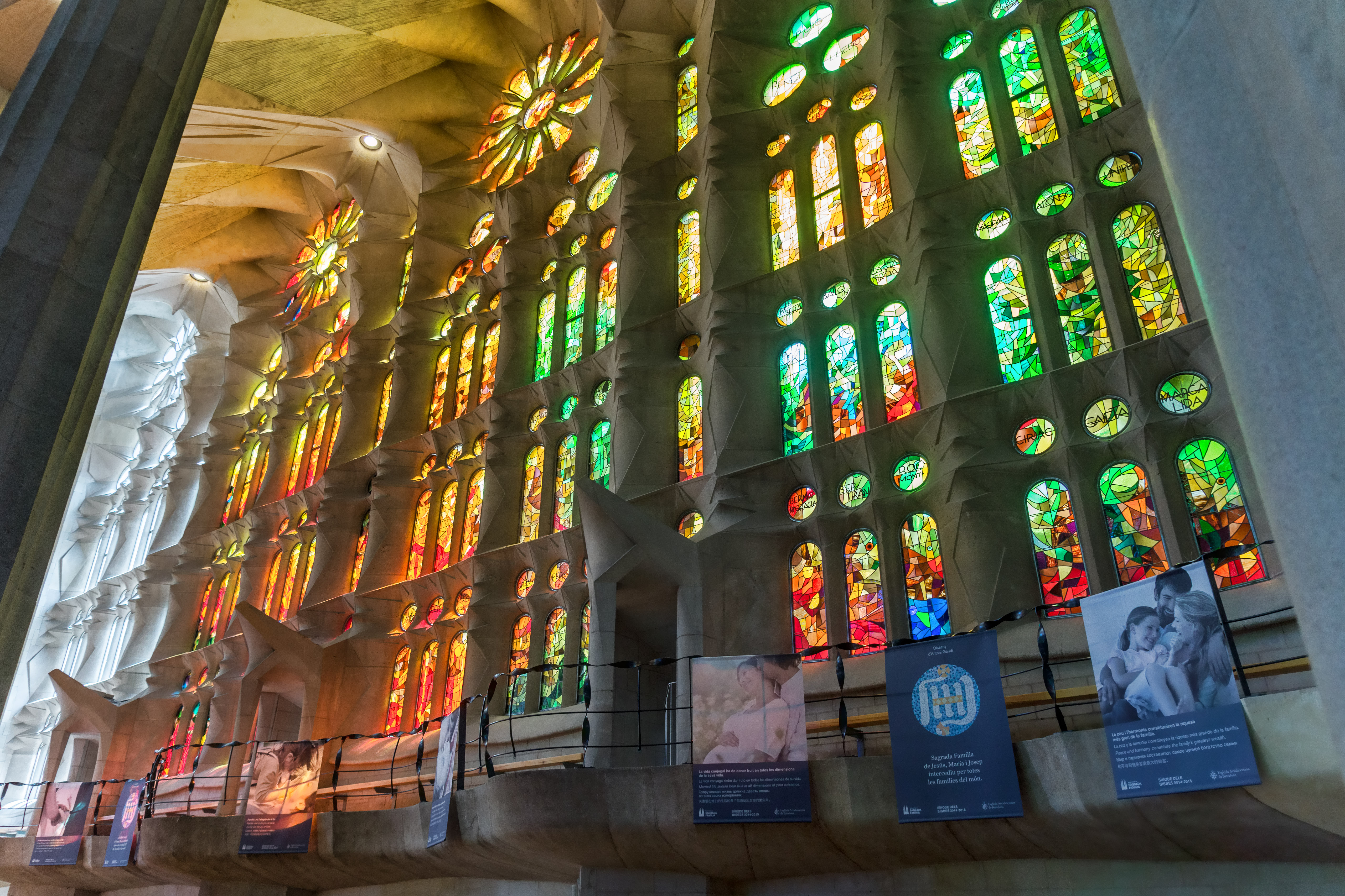 Vitraux de la Sagrada Familia à Barcelone